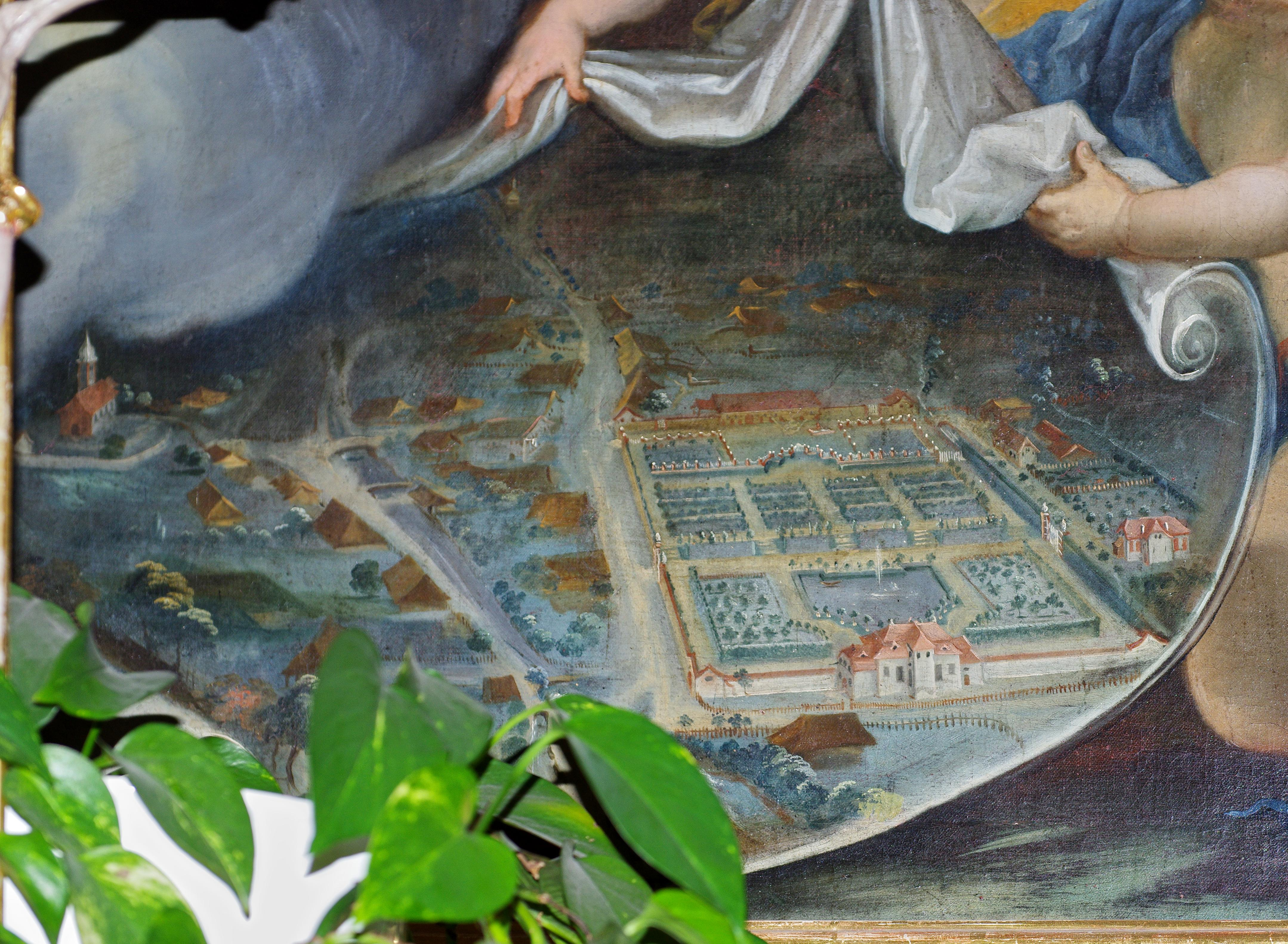 St. Hilarius, Ausschnitt aus dem Hochaltarbild aus dem Jahre 1730, welches von Franz Bernhard Altenburger signiert ist mit „F.B.. Altenburger jnv. et pinxit 1730“. Der Ausschnitt zeigt Schloss, Kirche und Ortschaft in ihrem damaligen Aussehen.